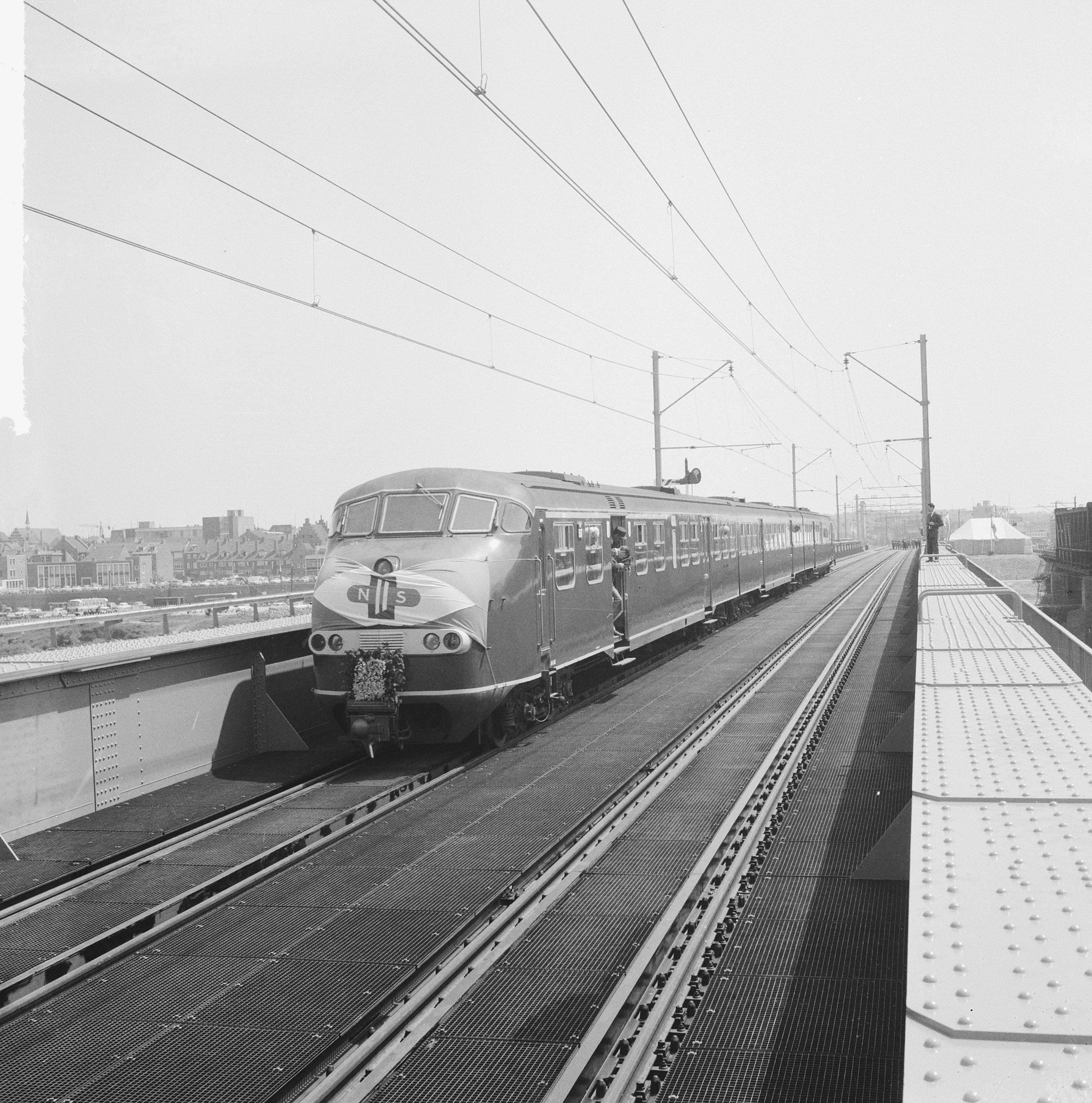 Collectie / Archief : Fotocollectie Anefo Reportage / Serie : [ onbekend ] Beschrijving : Nieuwe spoorburg over de Maas bij Venlo in gebruik genomen een trein met genodigden over de brug te laten rijden Datum : 23 mei 1964 Locatie : Maas, Venlo Trefwoorden : genodigden, spoorbruggen, treinen Fotograaf : Gelderen, Hugo van / Anefo Auteursrechthebbende : Nationaal Archief Materiaalsoort : Negatief (zwart/wit) Nummer archiefinventaris : bekijk toegang 2.24.01.03 Bestanddeelnummer : 916-4647